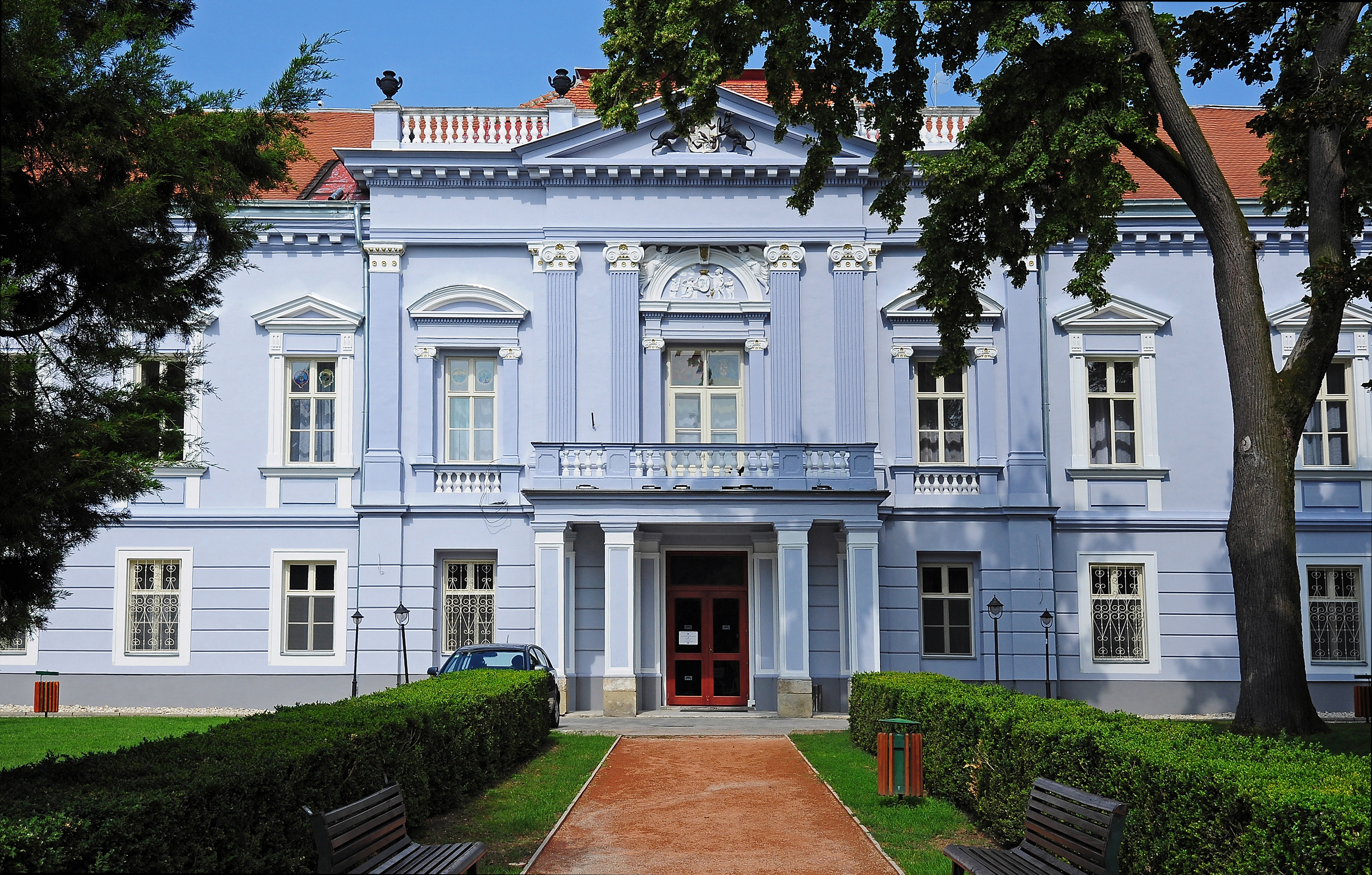 Mojmírovce, kaštieľ, Slovensko